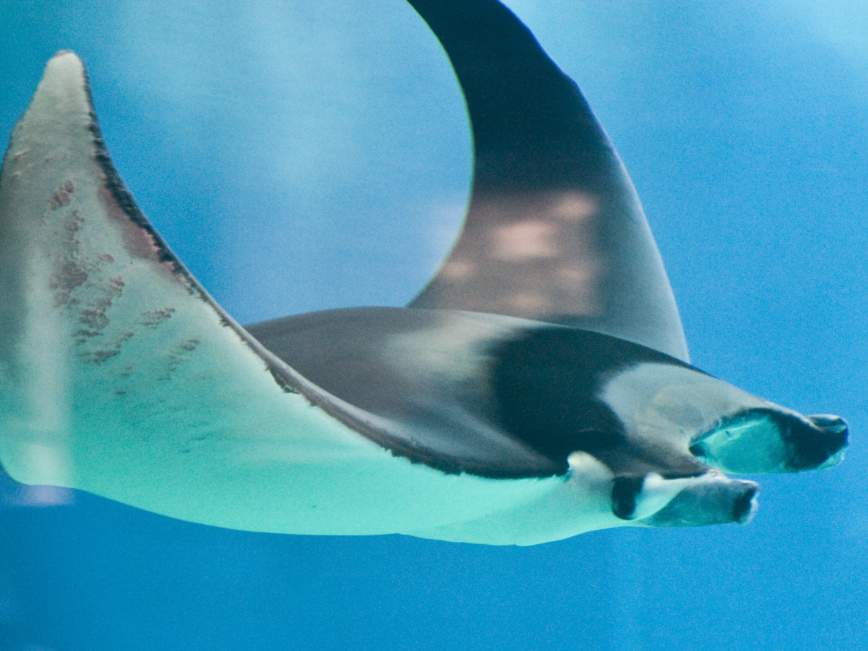 Atlantic mobula (Mobula mobular)